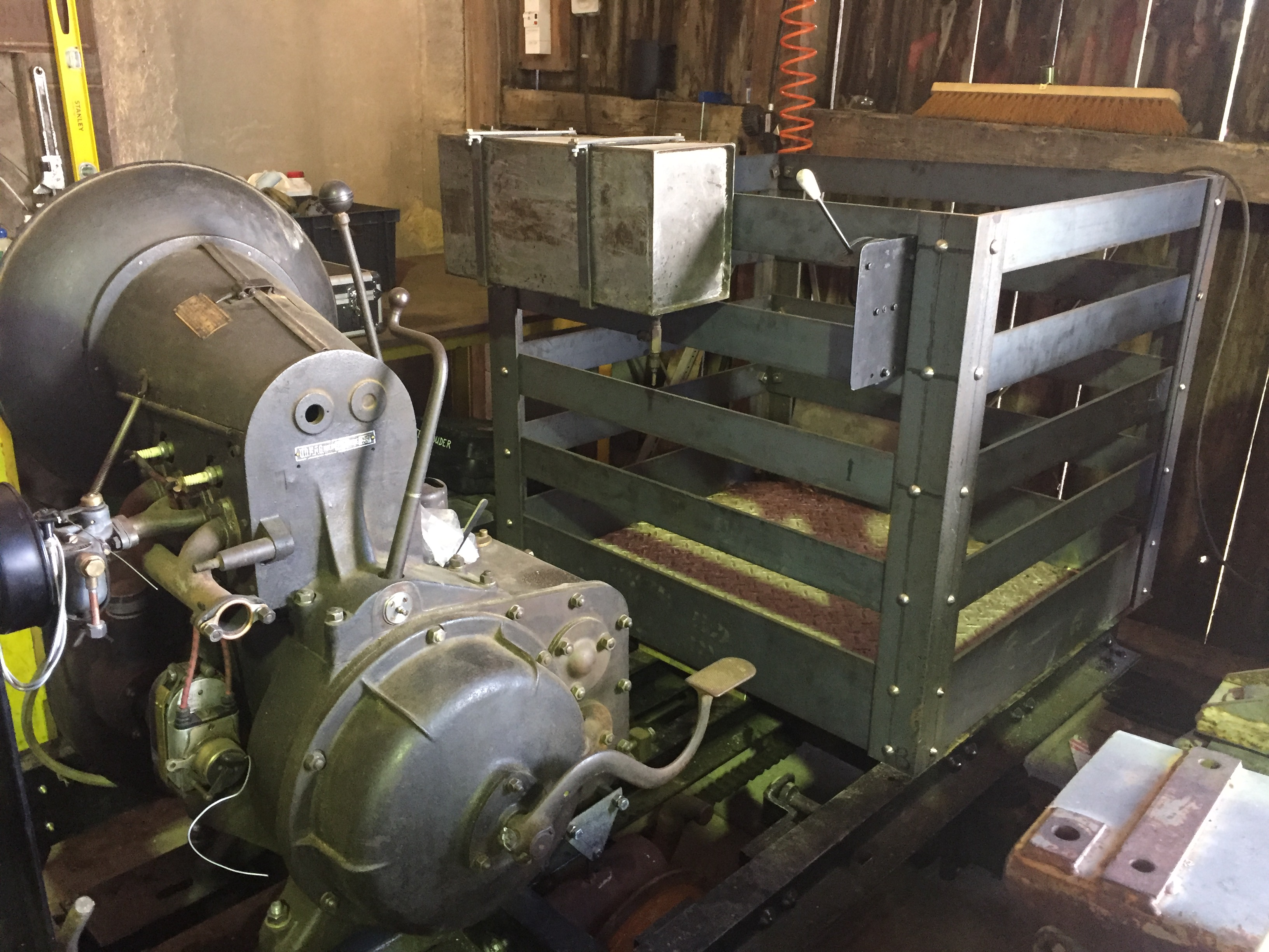 Locotracteur Pétolat de 1929 en cours de restauration au Musée de la barque fuveau.